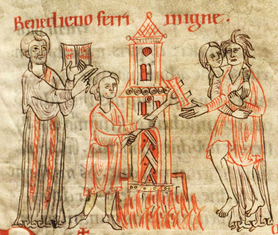 Die Probe des glühenden Eisens. Bei dieser Form des Ordals musste ein glühendes Eisen angefasst und ein Stück weit getragen werden. Ausschnitt aus einer Seite des Rituale in der Stiftsbibliothek Lambach. Cml LXXIII. f. 64v, 72r (Ende des 12. Jahrhunderts)